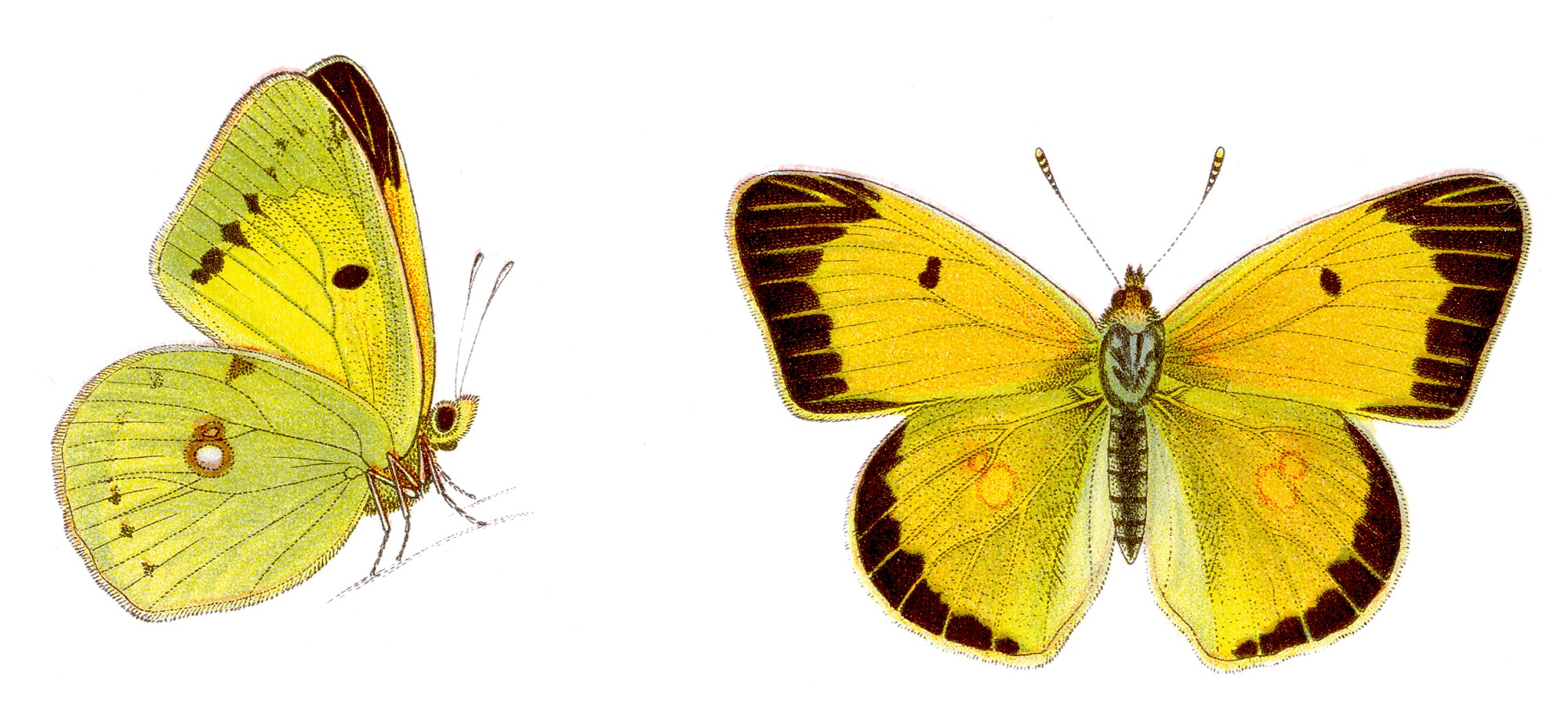 Postillon - Colias croceus